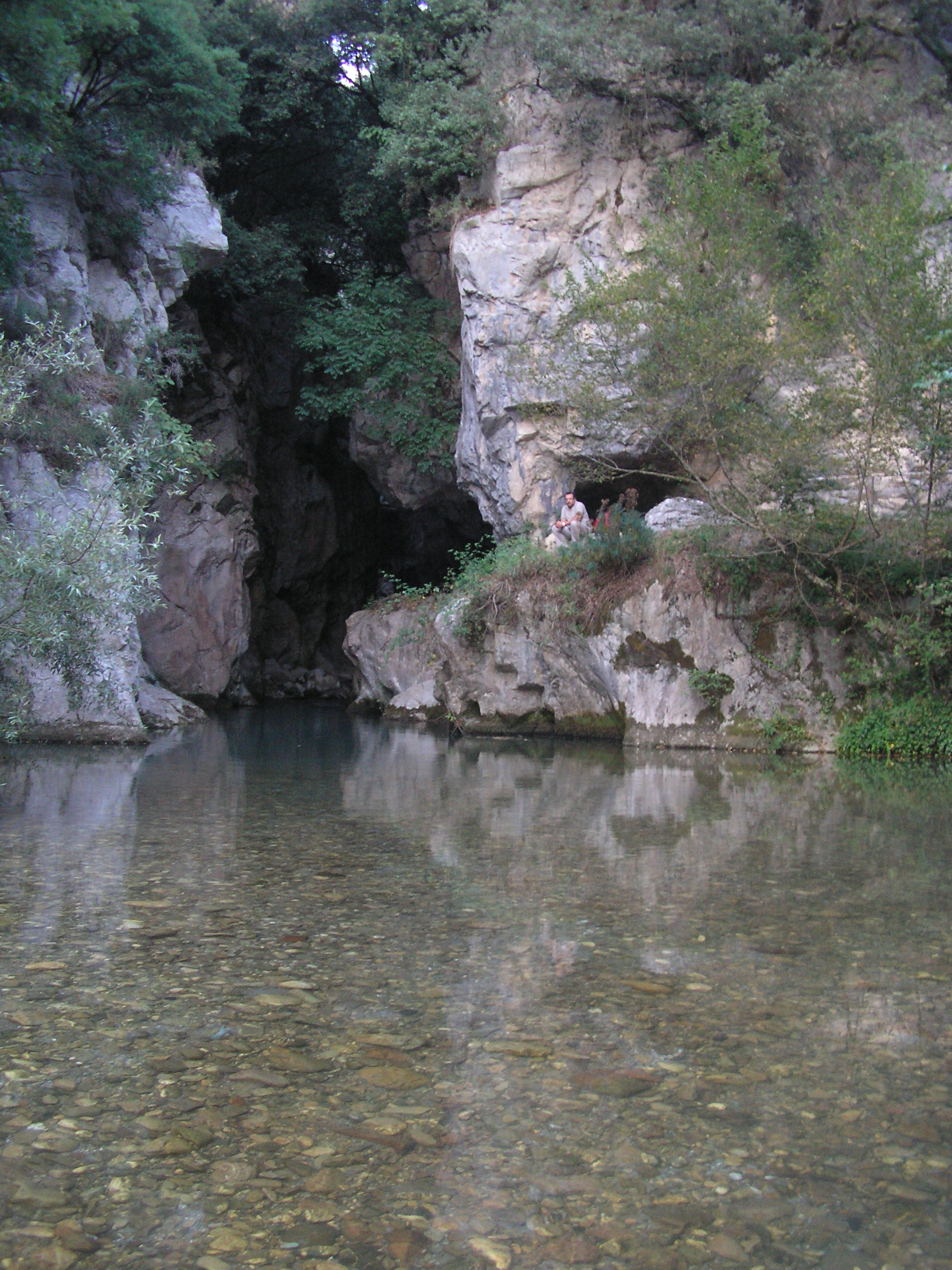 Sorgenti del fiume "Sammaro" tra i comuni di Sacco e Roscigno in Provincia di Salerno — Campania. Parco Nazionale del Cilento e del Vallo di Diano.